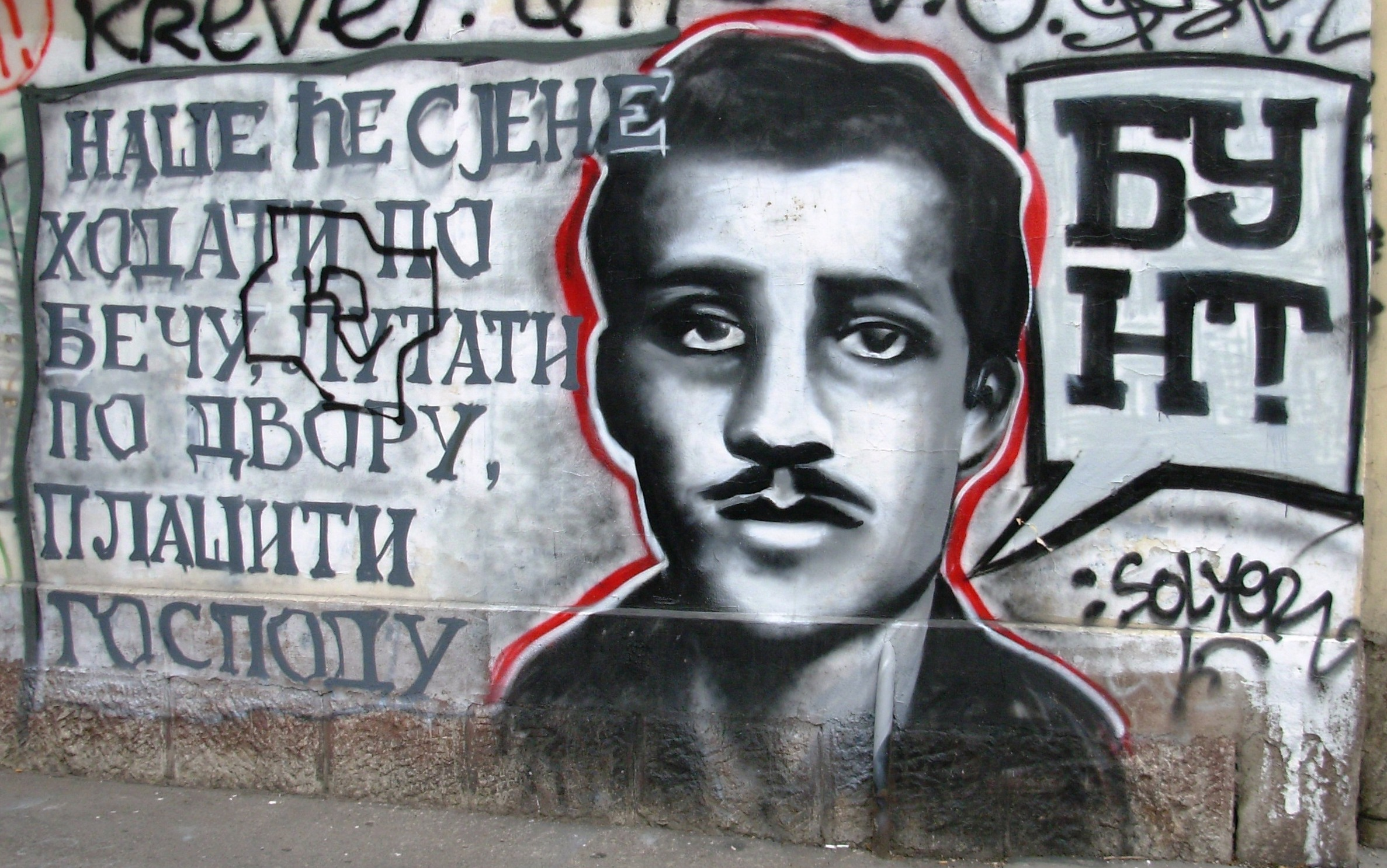 Графит на зиду у Београду. Сликао Голдфингер